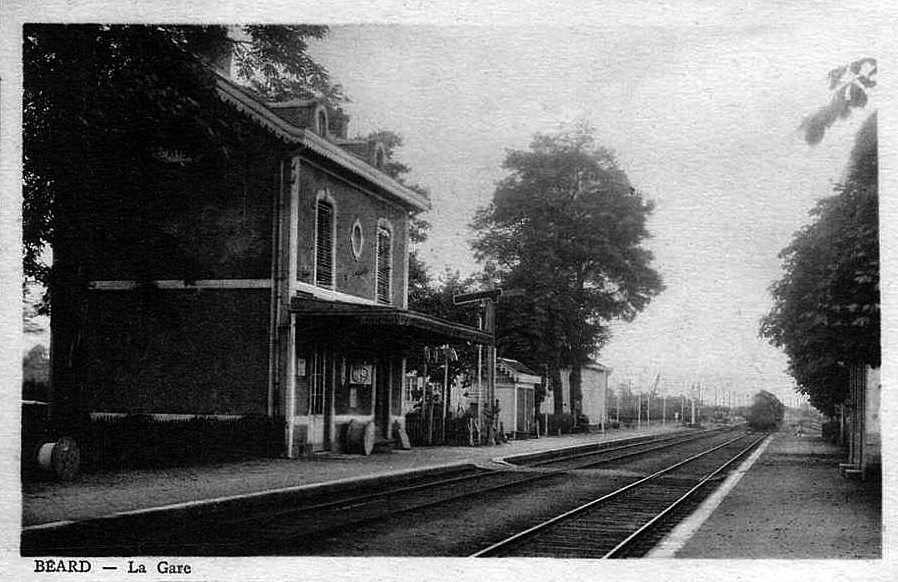 Intérieur de la gare de Béard au début des années 1900.